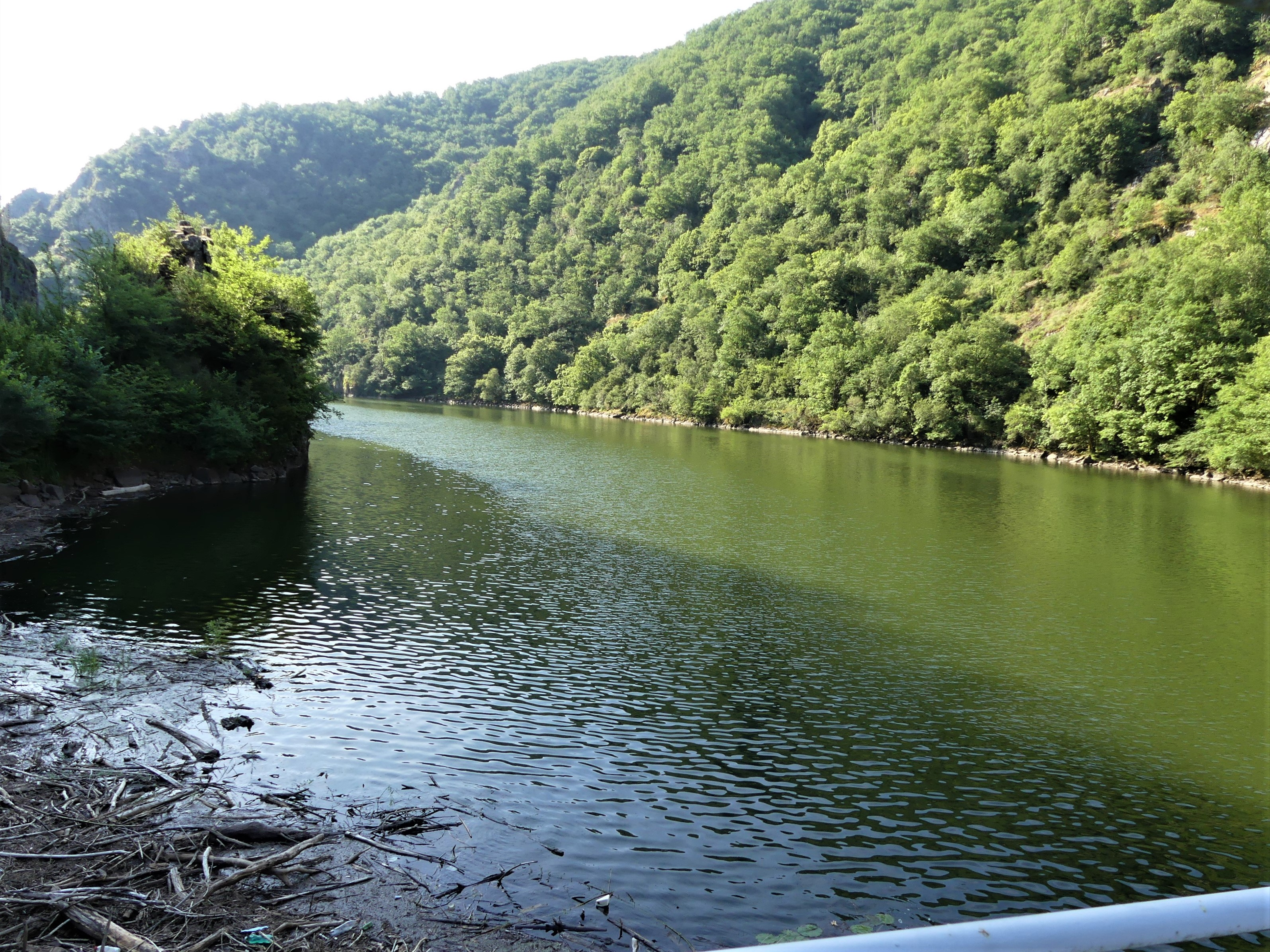 Le Lot, juste en amont du barrage de Golinhac, Aveyron France.